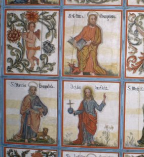 Deckengemälde in Markt Heiligenstadt